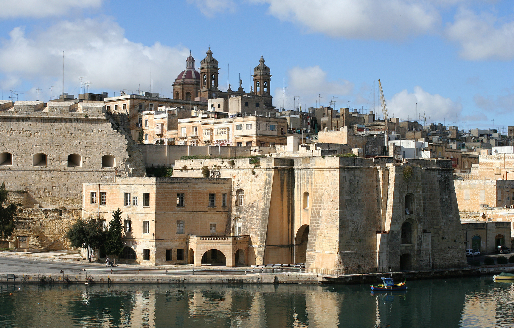 Malta, Senglea